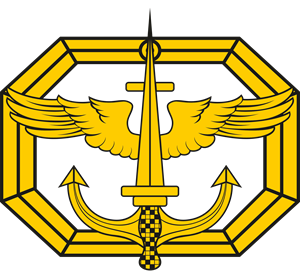 Gambar ini adalah Lambang Komando Pasukan Khusus